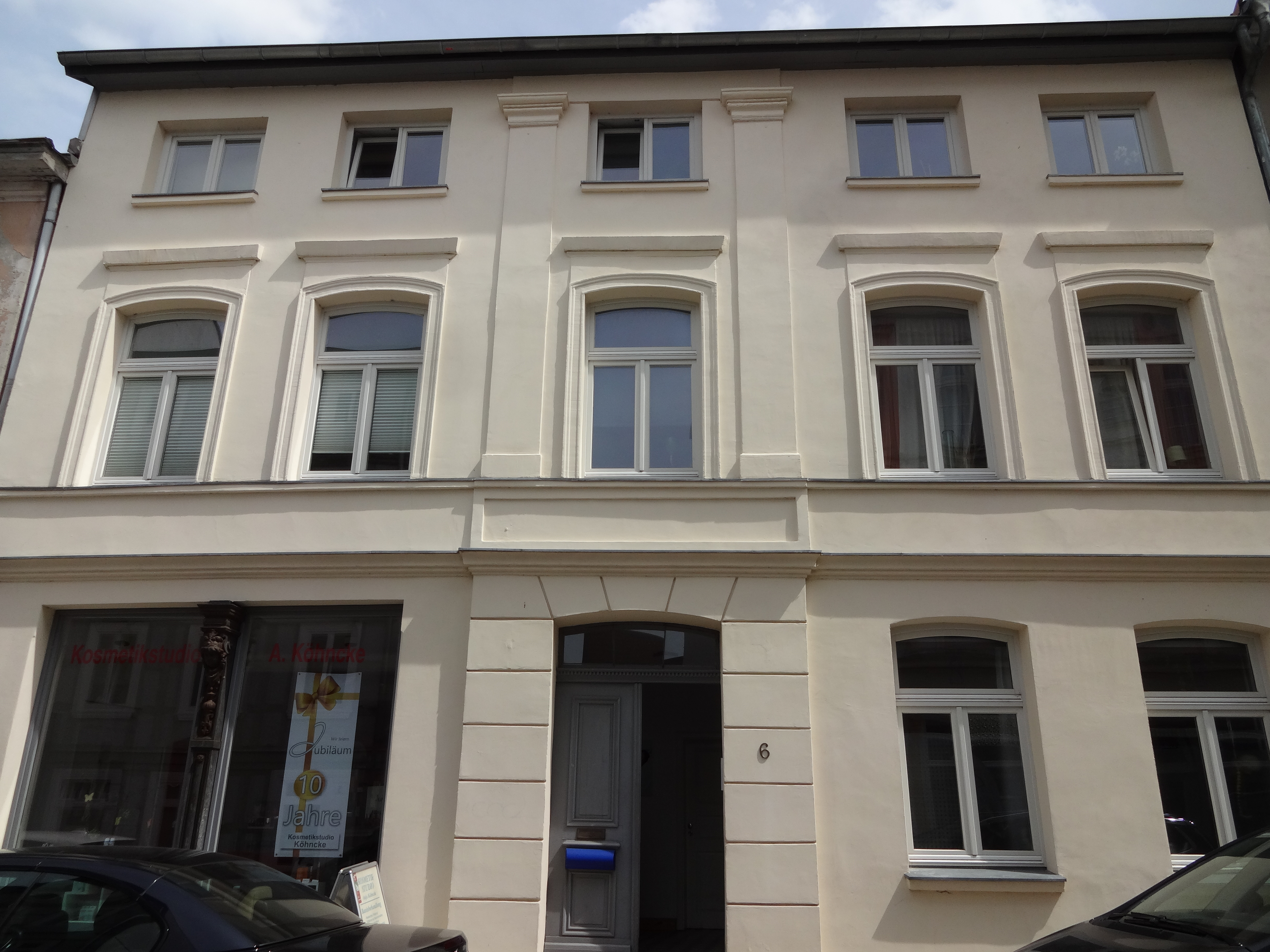 Denkmalgeschütztes Haus in der Schusterstraße 6 in Schwerin